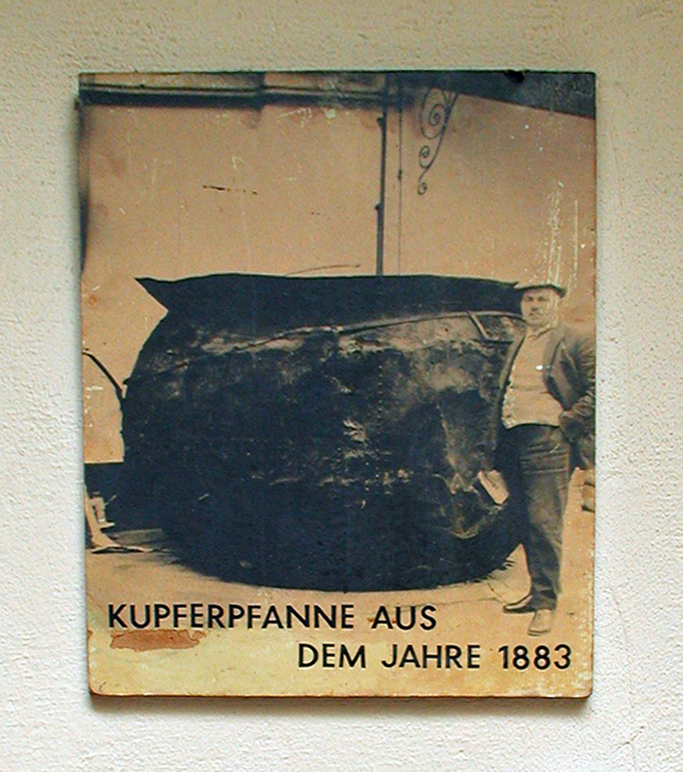 Würze- oder Sudpfanne, Aufnahme um 1883. Hausbrauerei Päffgen, Köln